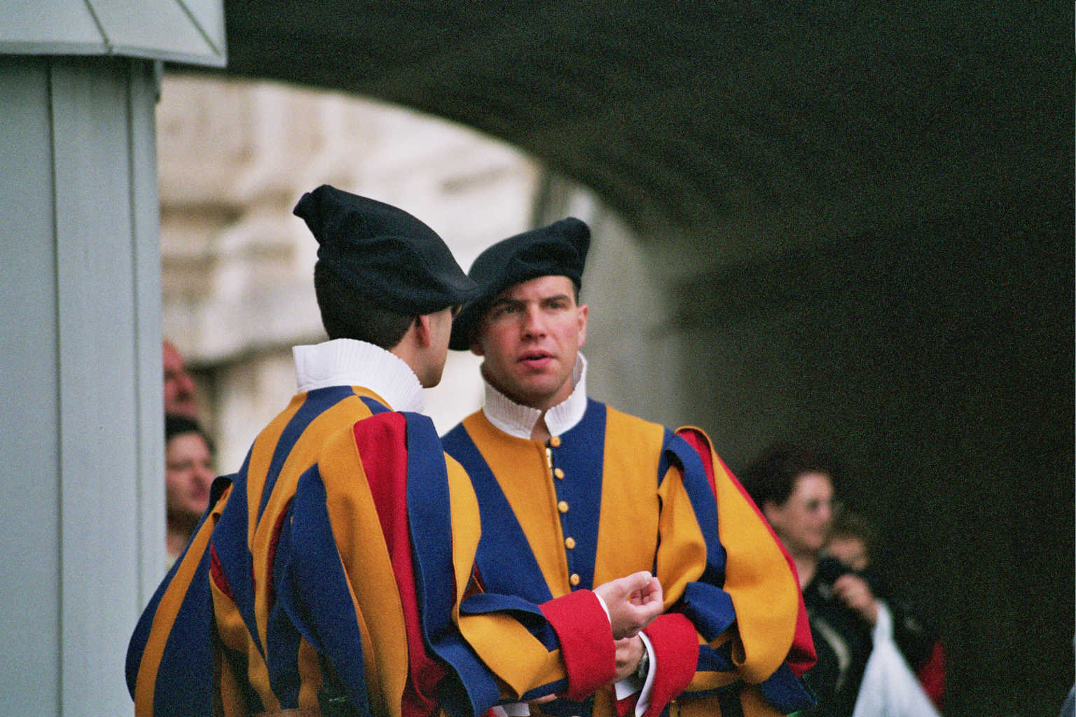 Guardie Svizzere Pontificie (particolare)